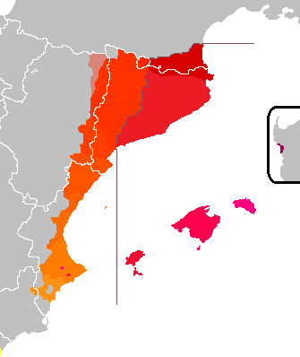 Lenguas iberorromances orientales